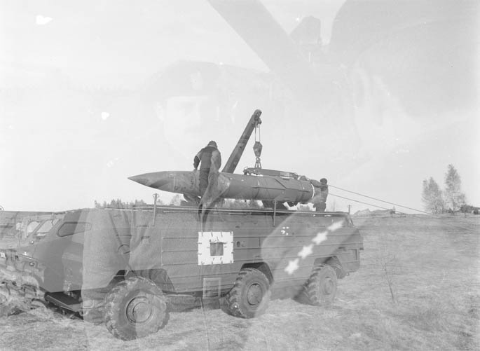 Pierwszy start Toczki w WP